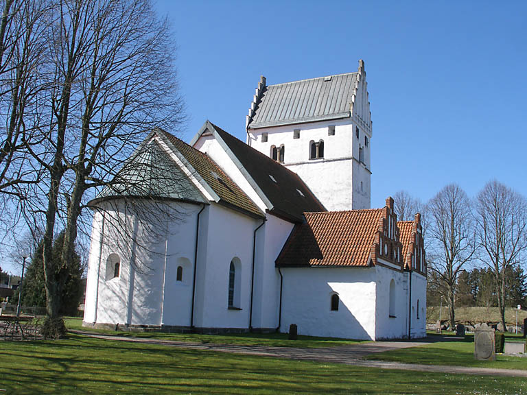 Norra Åsums kyrka, sedd från nordost.